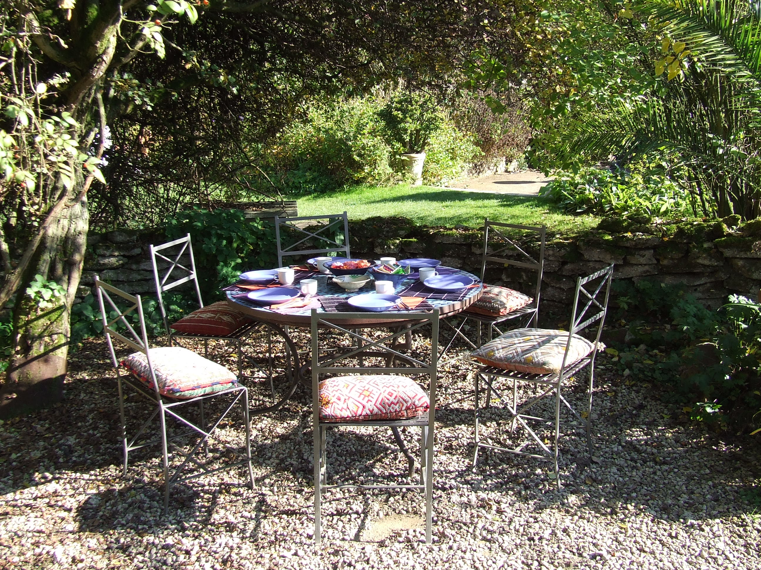 Zicht op een zitje in de tuin in een deel van de Millinger Theetuin, Klaverland 9, 6566 JD Millingen aan de Rijn